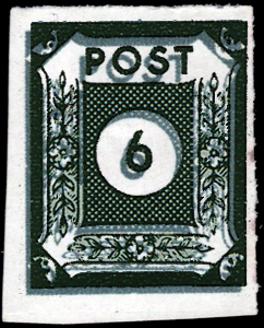 Редкая разновидность стандартной марки Восточной Саксонии первого стандартного выпуска. Чёрно-зелёная шестёрка двойной оттиск на марке чёрно-сине-зелёного цвета (реконструкция).